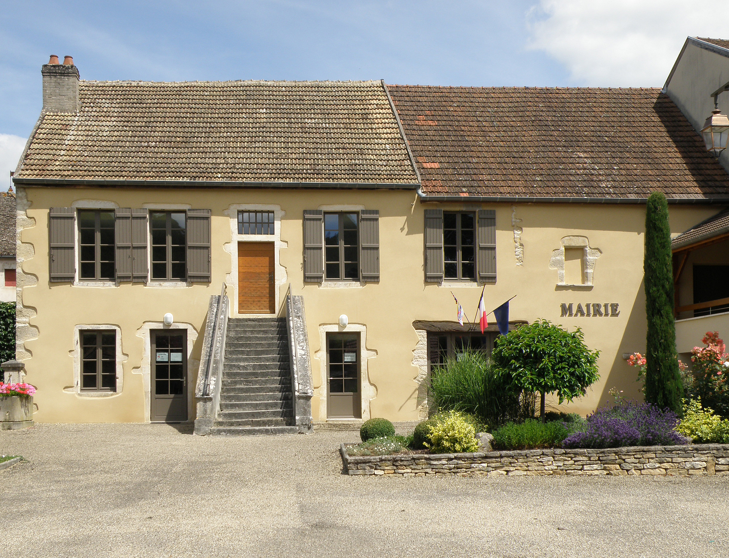 Auxey-Duresses (Côte-d'Or, France). Mairie.